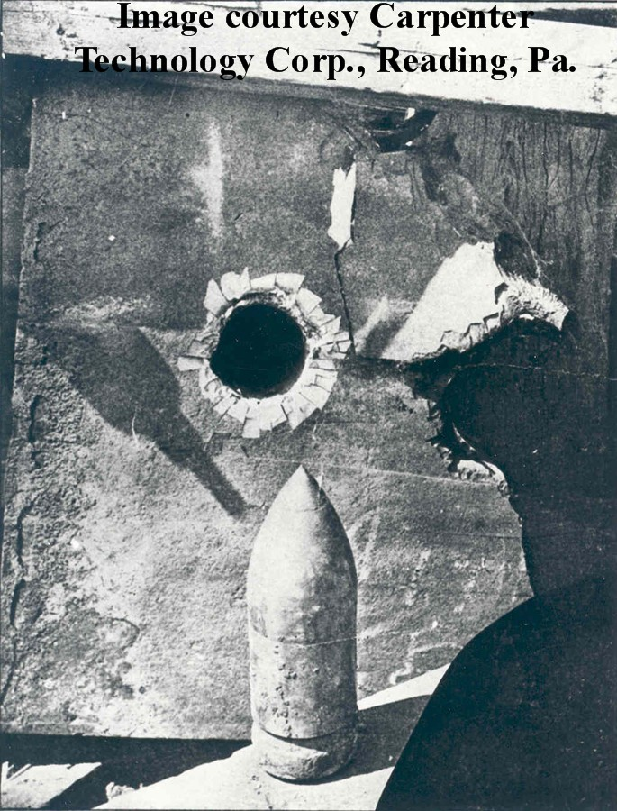 Carpenter Steel Company projectile test verses steel plate.